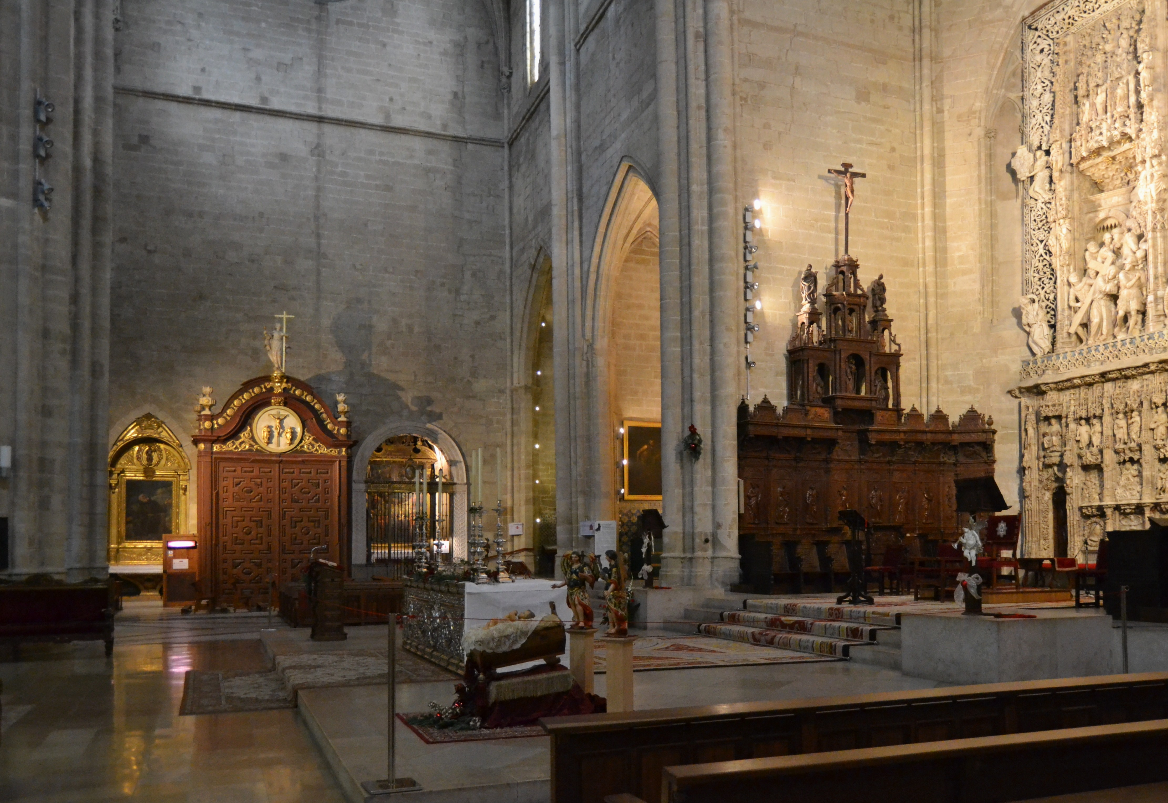 Transsepte, catedral d'Osca.